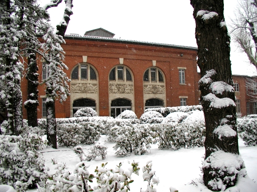 La Cour des Anciennes Facultés de l'Université Toulouse I